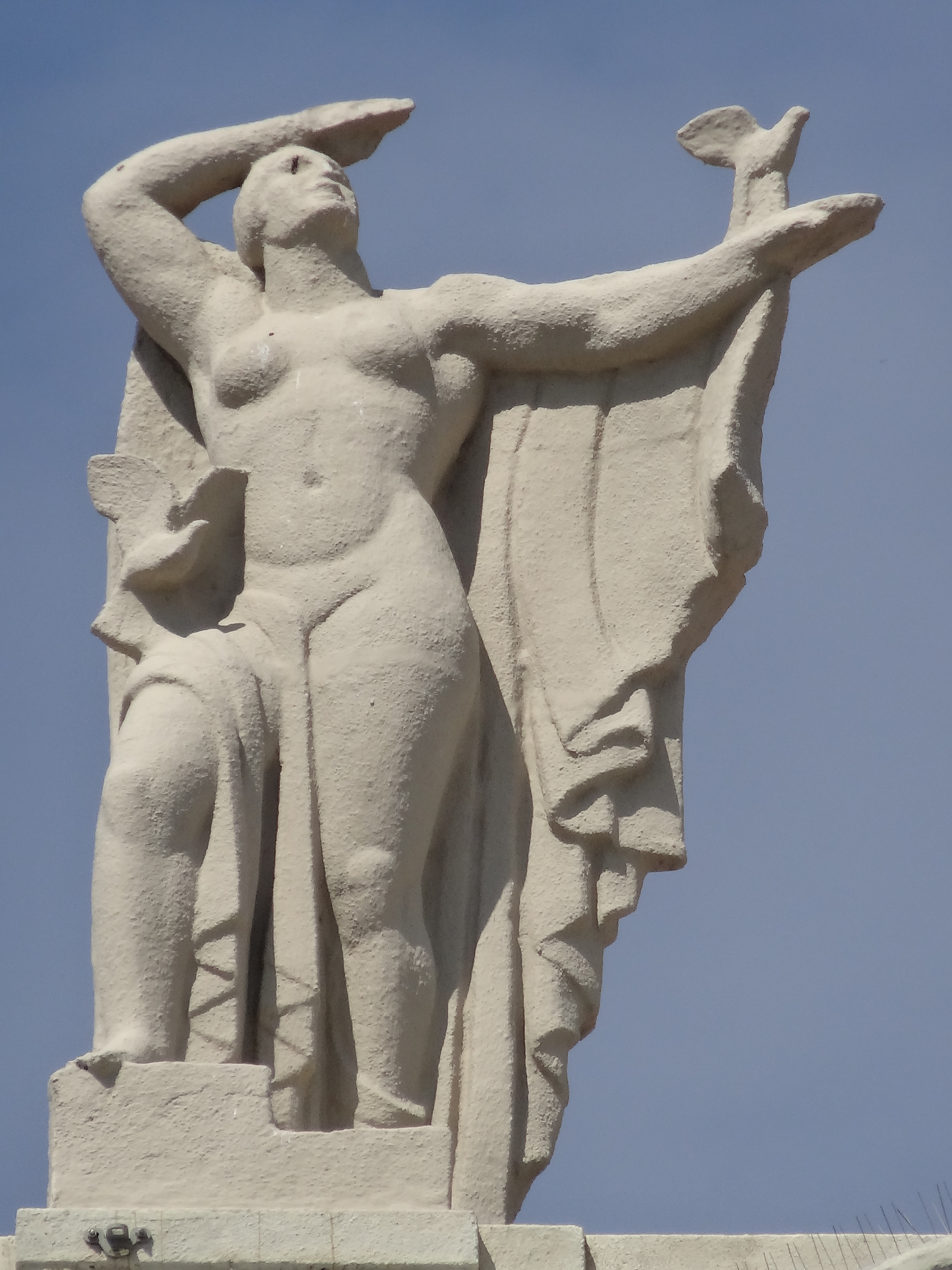 Els personatges de la Comandància (Felipe Coscolla Plana). Pl. del Portal de la Pau, 5, edifici de la Comandància Militar (Barcelona). La llibertat: Una dona nua, amb un mantell que li cobreix només l’esquena. Un extrem l’aguanta amb la ma esquerra i un plec li cau damunt l’engonal dret. Te el braç esquerre completament estirat i a la ma un colom en actitud d’emprendre el vol. Sobre la seva cuixa dreta n’aleteja un altre. Mira al cel, se suposa que a un altre ocell que ha sortit volant i amb la ma dreta fa visera sobre la cara per evitar que la llum del sol li dificulti la visió.